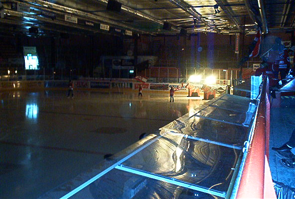 Bild på Mora IKs intro.